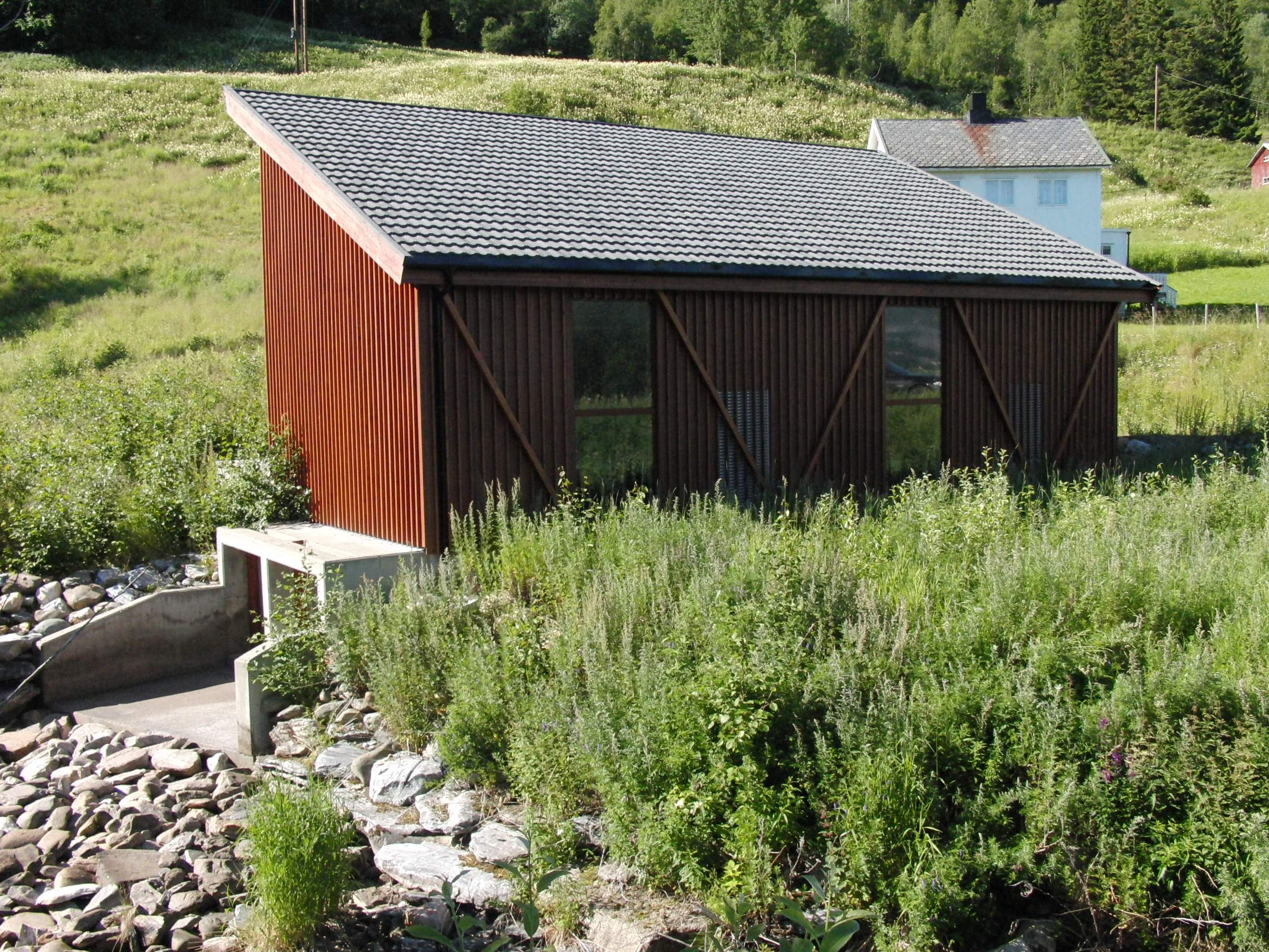 Dversetelva kraftverk